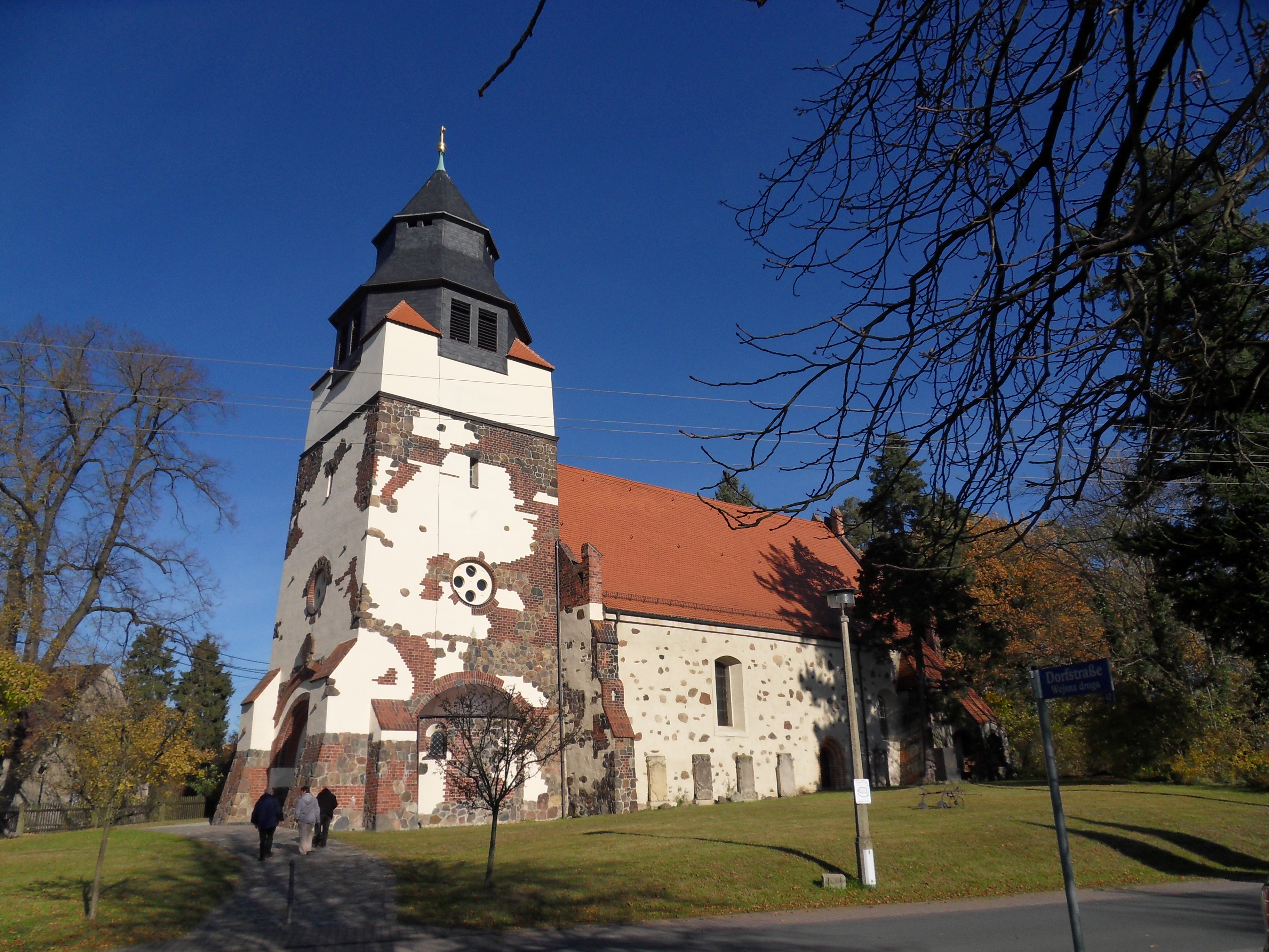 Denkmalgeschützte Dorfkirche in Hornow